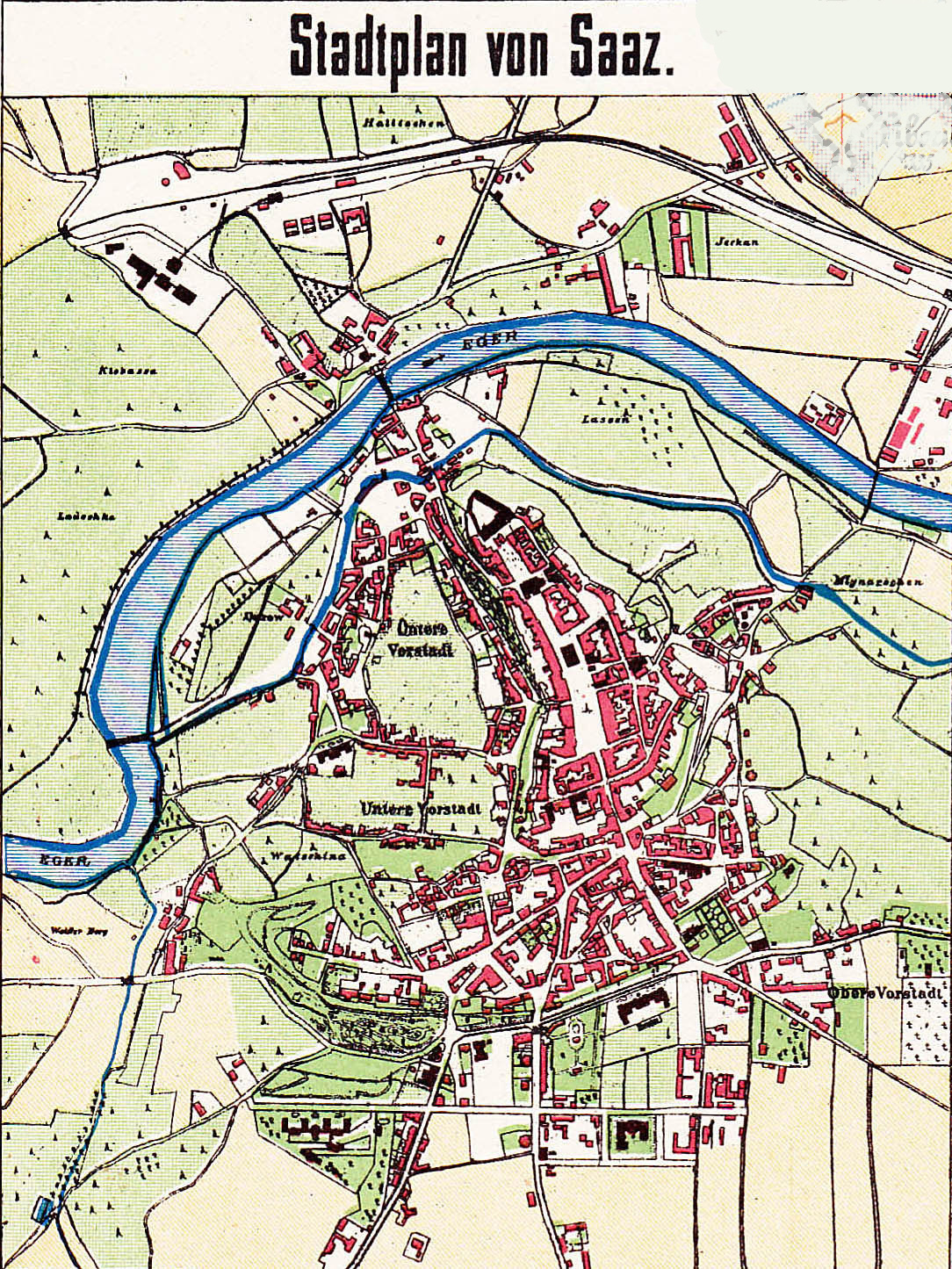 Karte von Saaz (um 1900), aus Karl Tutte: Der politische Bezirk Saaz, Saaz 1904